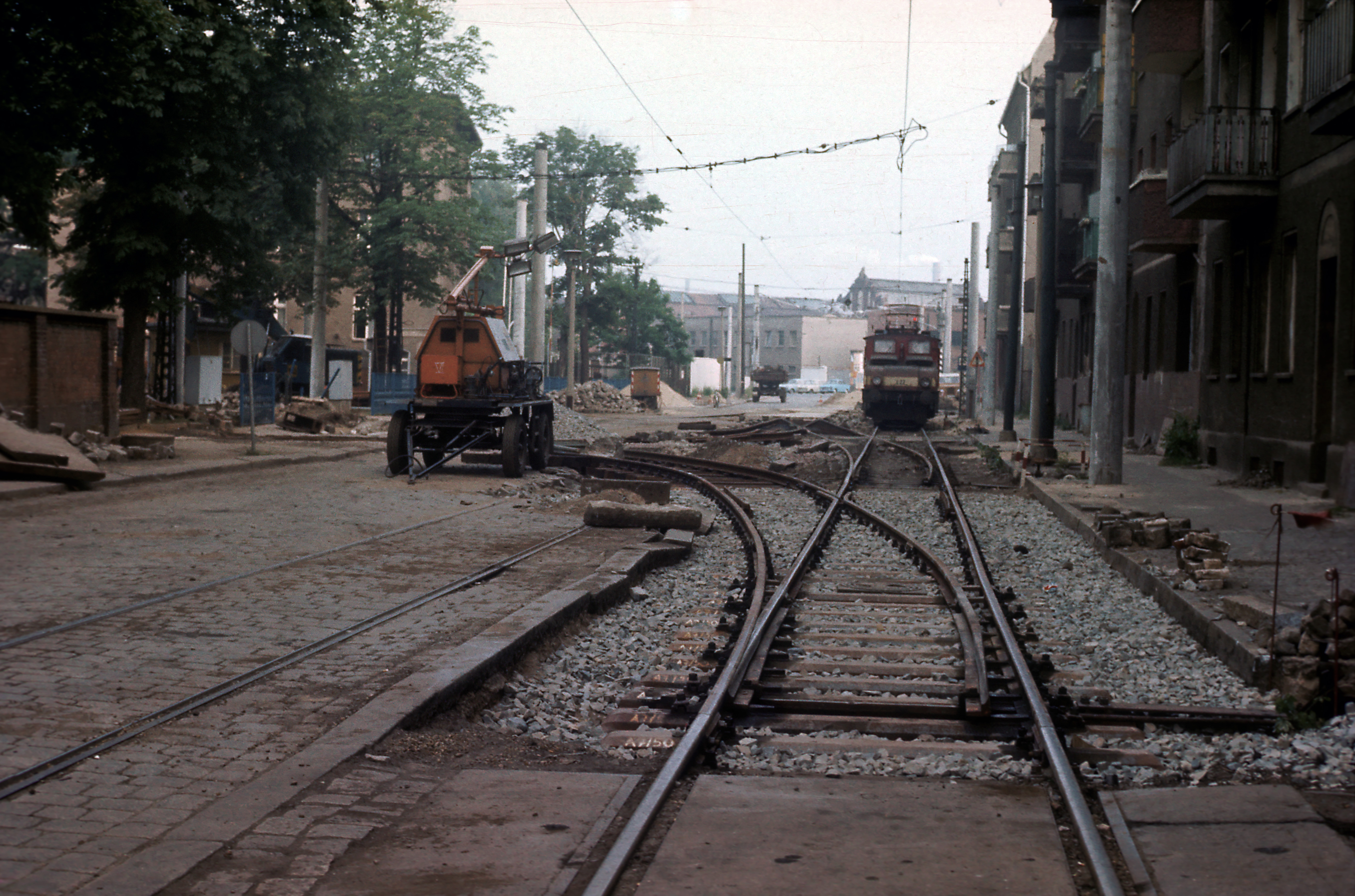 Nalepastraße vor dem Straßenbahn-Bw aus Richtung Bf Rummelsburg, zum Aufnahmezeitpunkt wird die Einbindung grundlegend umgebaut. Die Weiche im Vordergrund ist die Bw-Einbindung für die Lokomotiven der Industriebahn, dahinter und vor der Lokomotive 22 entsteht eine Gleisverbindung zum Straßenbahnnetz. Beide Netze sind aufgrund der Radsatzmaße eigentlich nicht verträglich, deshalb erhielten die übergehenden Straßenbahngüterzüge in der Folge auflegbare Passstücke für die Radlenker. Die Fahrleitung ist noch nicht an die veränderte Gleislage angepasst.Während der Bauzeit mussten die Industriebahnlokomotiven auf dem Streckengleis und in den Anschlüsssen abgestellt werden.